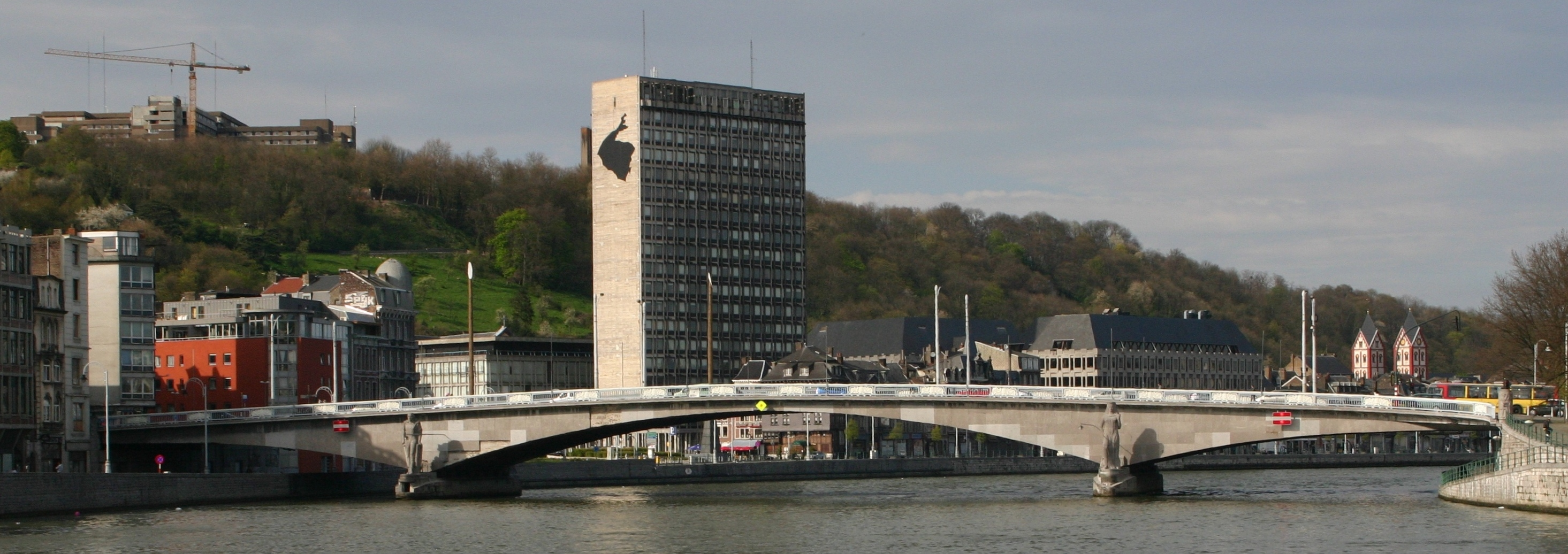 De Pont des Arches am Abrëll 2008. Kategorie:Brécken an der Belsch